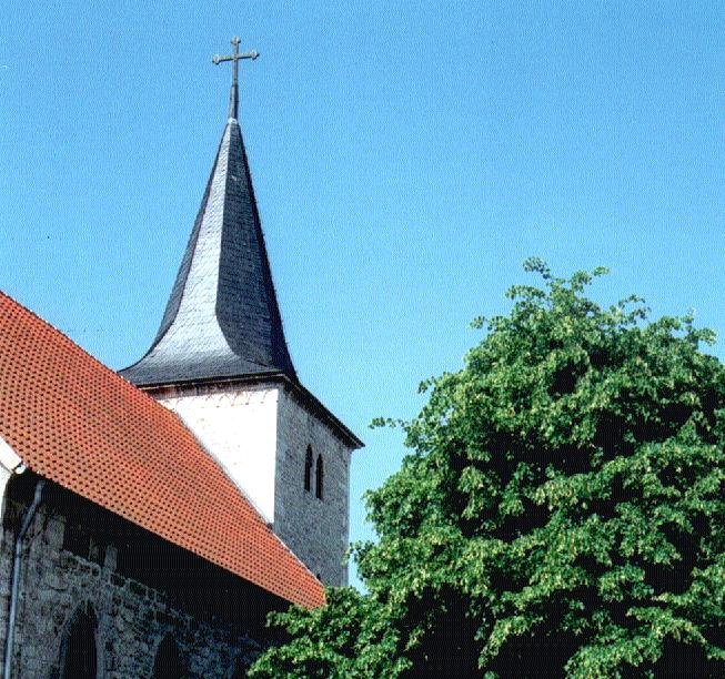 Evangelische Dorfkirche von Kaisershagen.